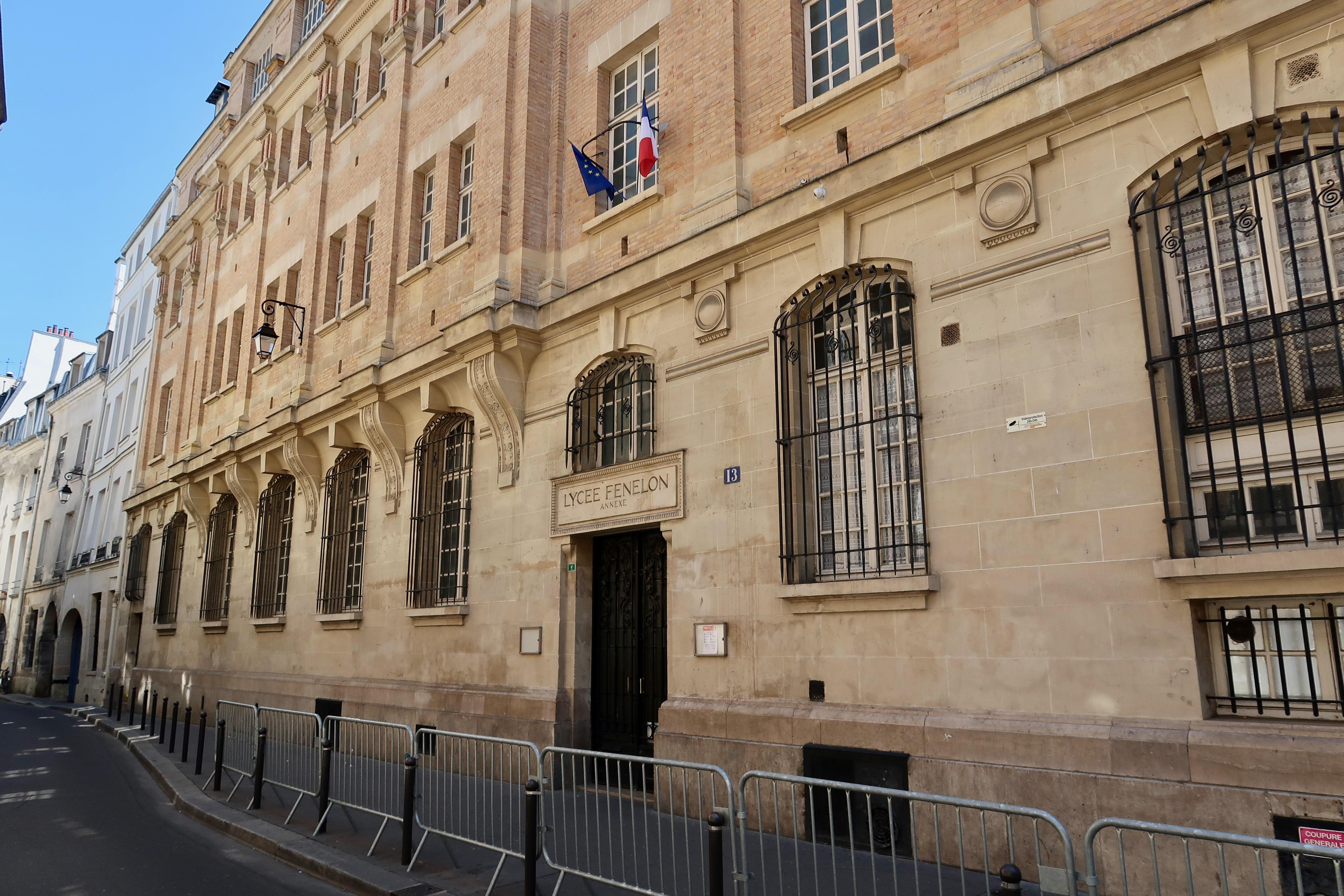 Annexe du lycée Fénelon, 13 rue Suger (Paris, 6e).